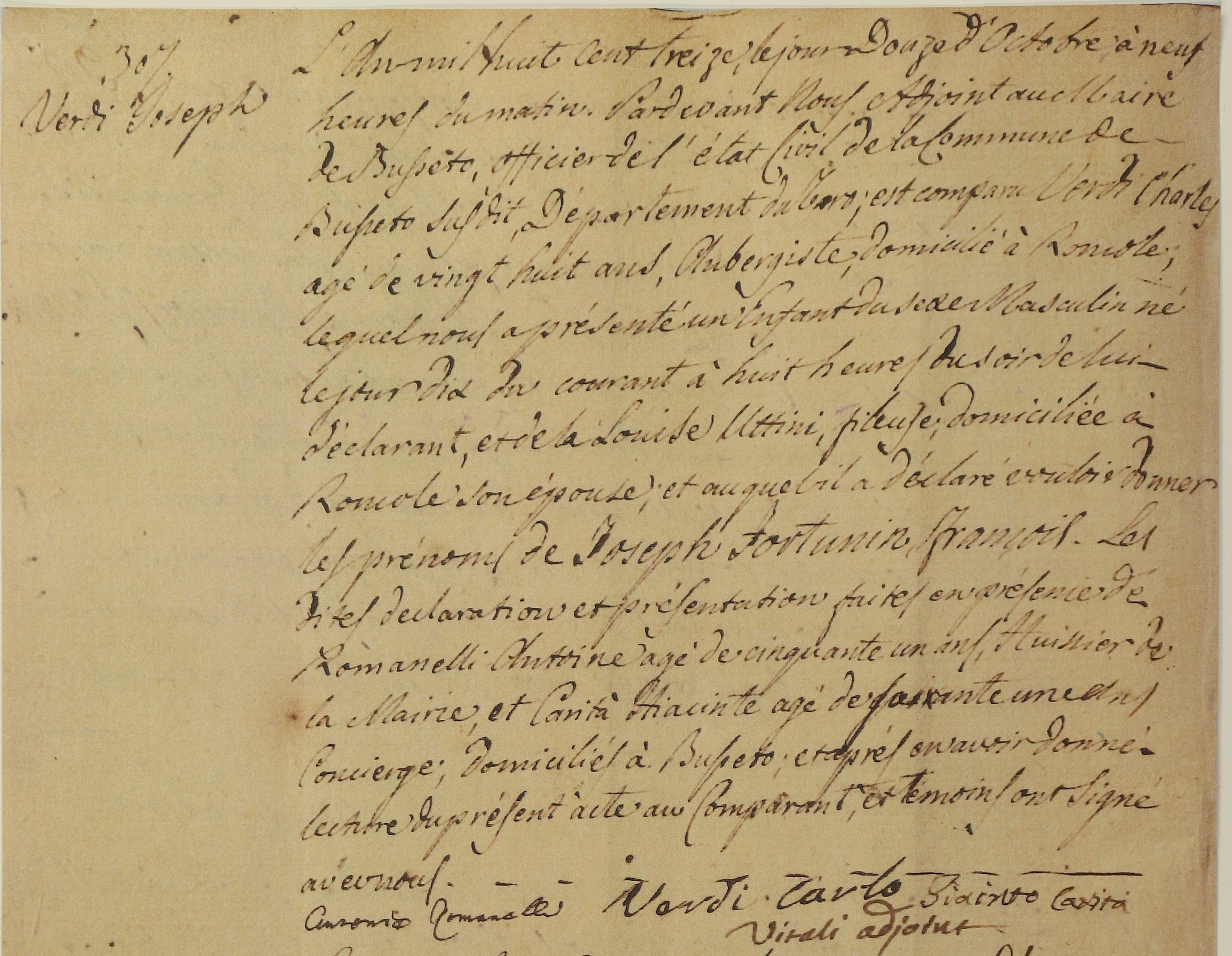 Acte de naissance de Joseph Verdi le 10 octobre 1813 à Busseto (Émilie-Romagne), qui faisait alors partie du royaume d'Italie